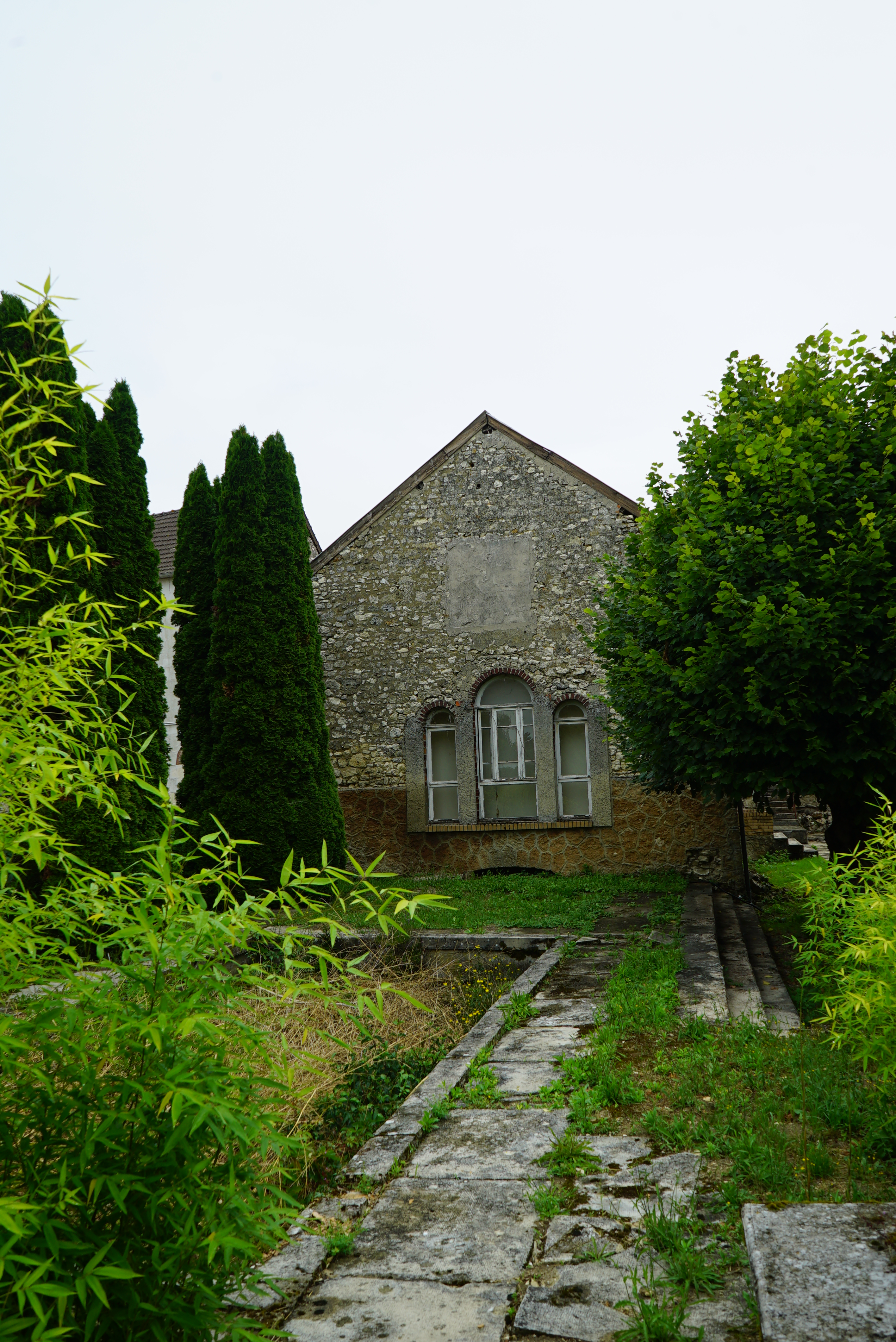 à Chatillon, dans l'enceinte de la Mairie.